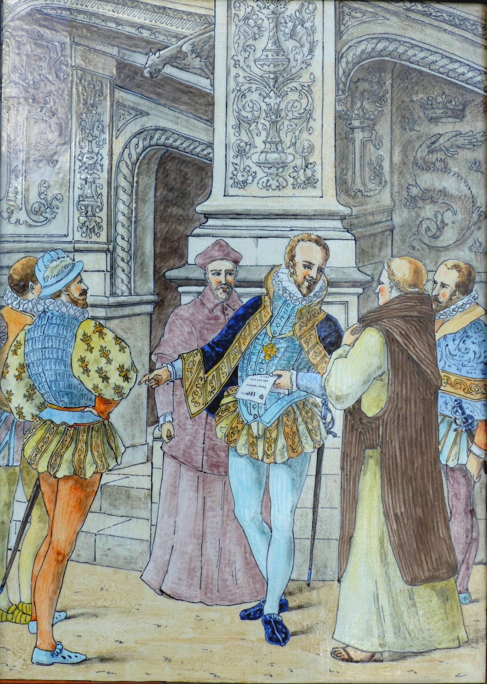 Plaque dessinée par A.W. Just en 1893 (35 x 25 cm)